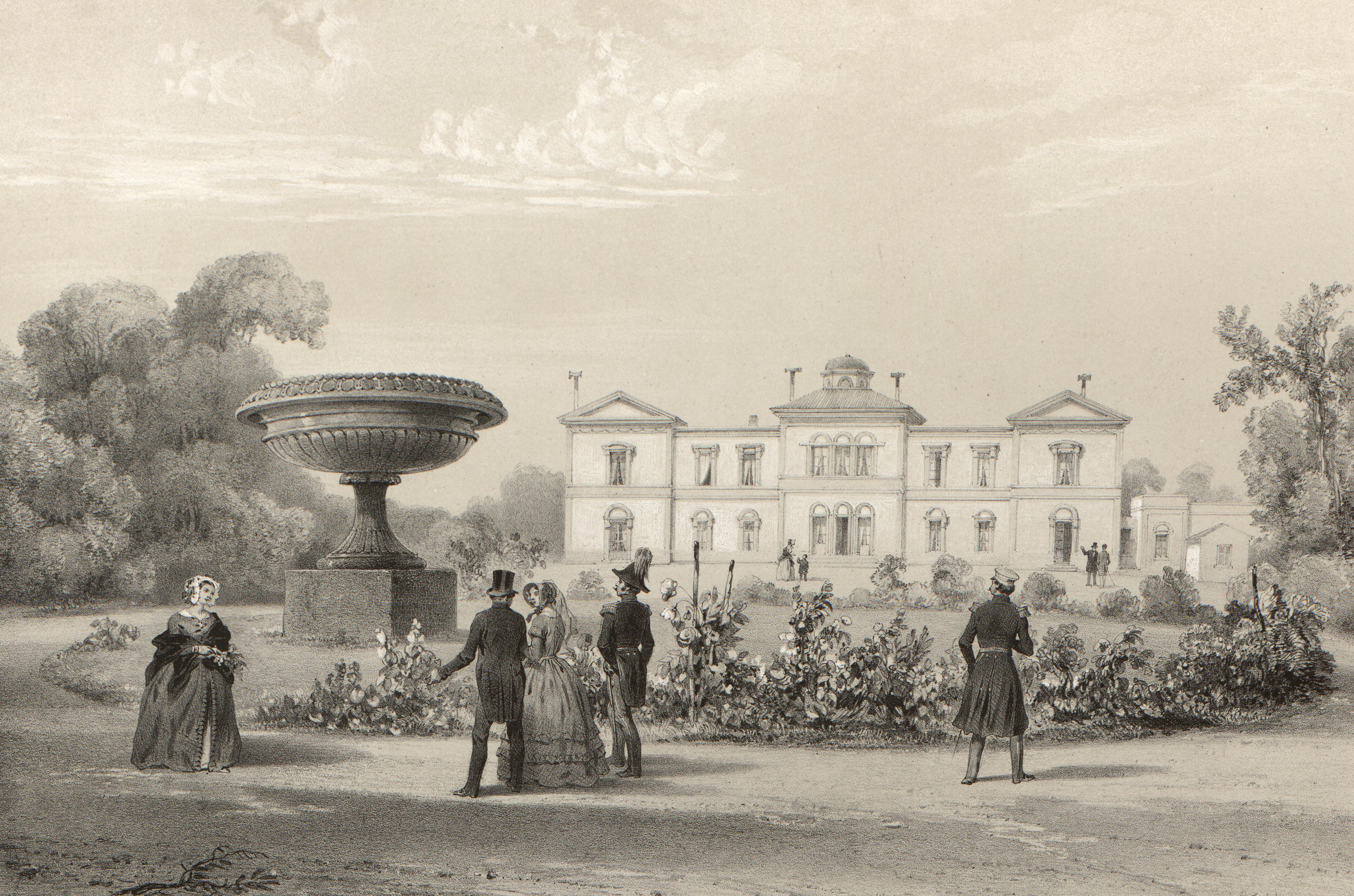 Illustrasjon hentet fra boken "Voyages de la Commission scientifique du Nord, en Scandinavie, en Laponie, au Spitzberg et aux Feröe" av ukjent forfatter og utgitt av Arthus BertrandParis : Arthus Bertrand, [1852] (Paris, [1852])